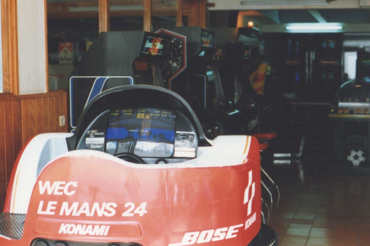 Arcade cabinet WEC Le Mans 24, Konami 1986